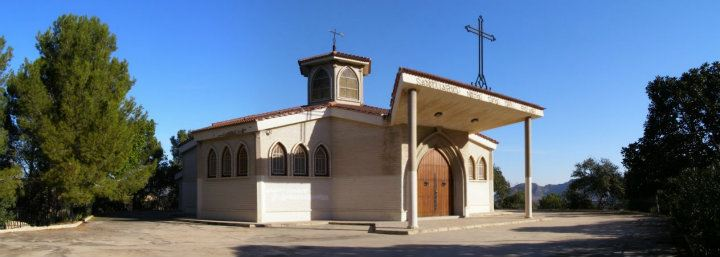 Ermita de Nuestra Señora del Pilar